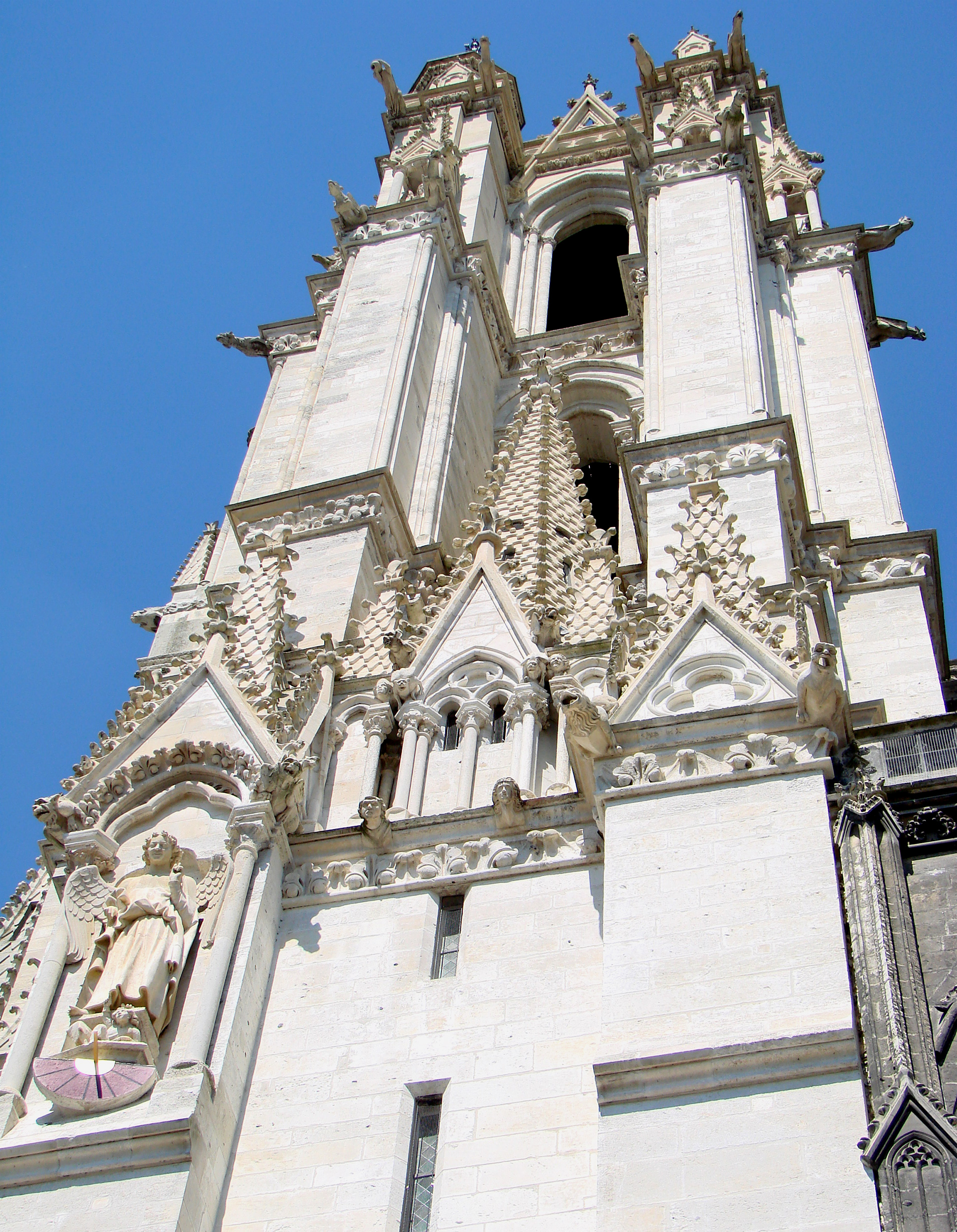 Cathédrale Notre-Dame d'Amiens.La tour sud, avec le cadran solaire.